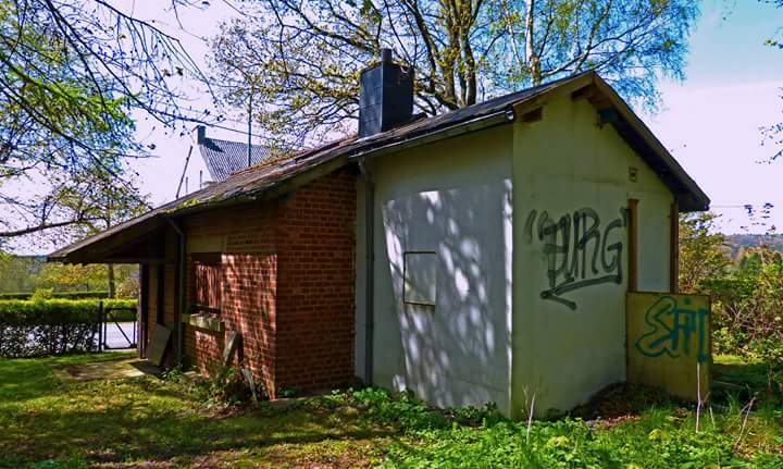 Le Poste d'Alerte 18 de Hauset.